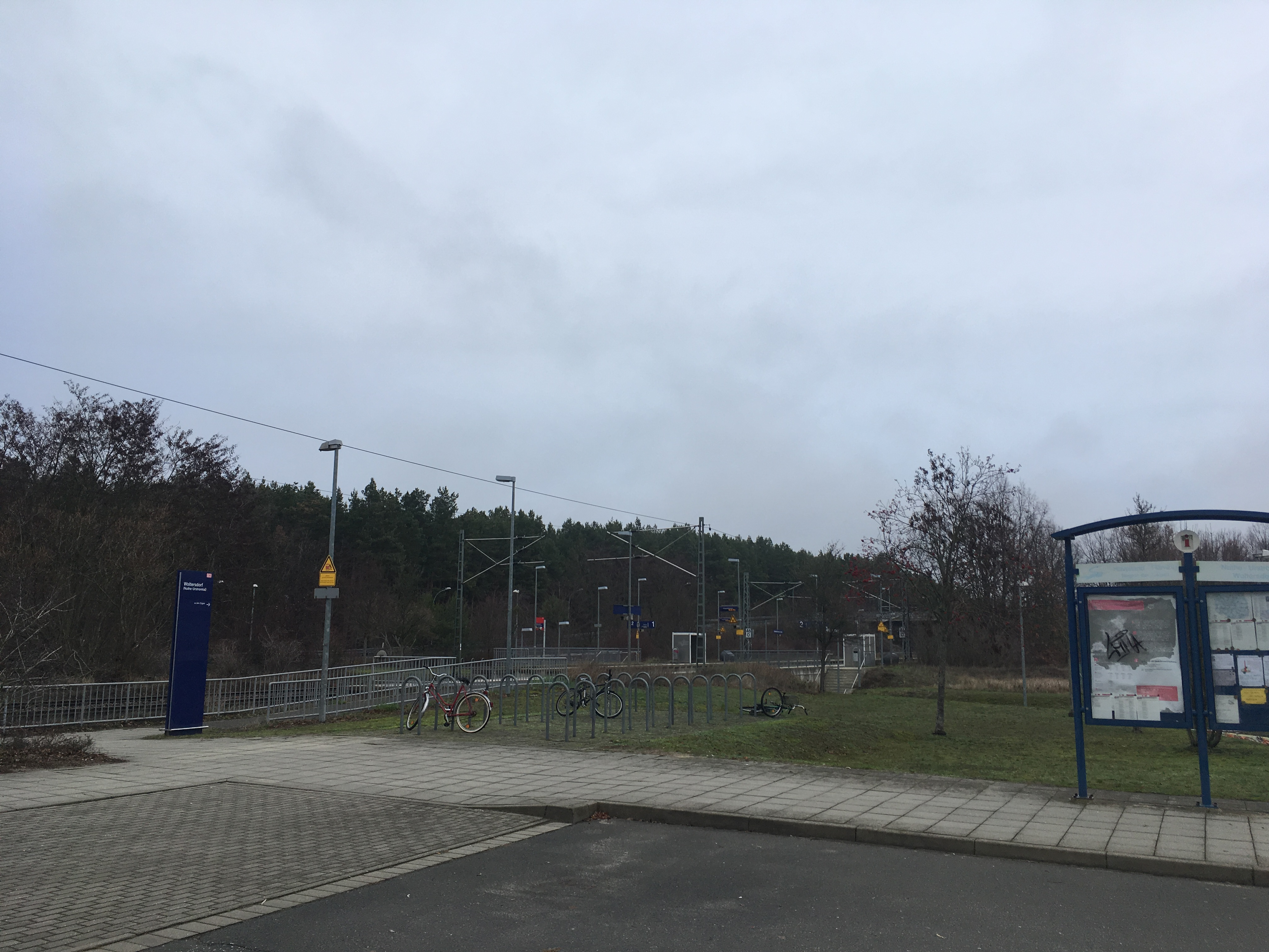 Woltersdorf, ein Ortsteil der Gemeinde Nuthe-Urstromtal in Brandenburg